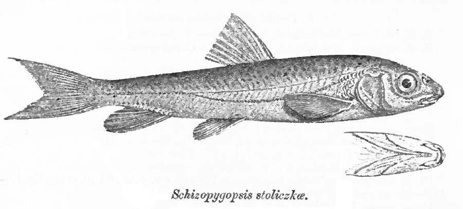 Schizopygopsis stoliczkæ = Schizopygopsis stoliczkai Steindachner, 1866